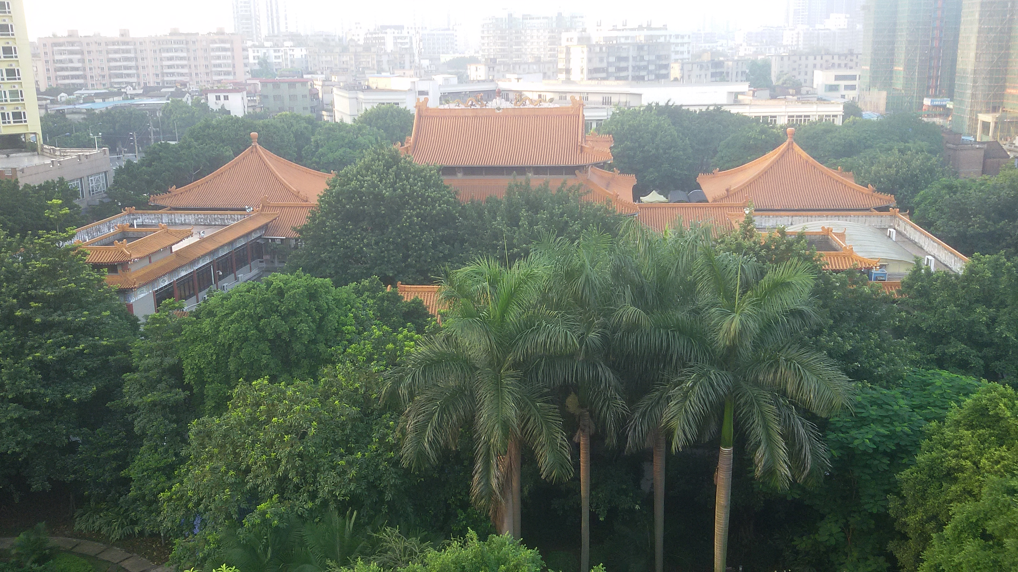 粵語: 黃大仙祠嘅正殿